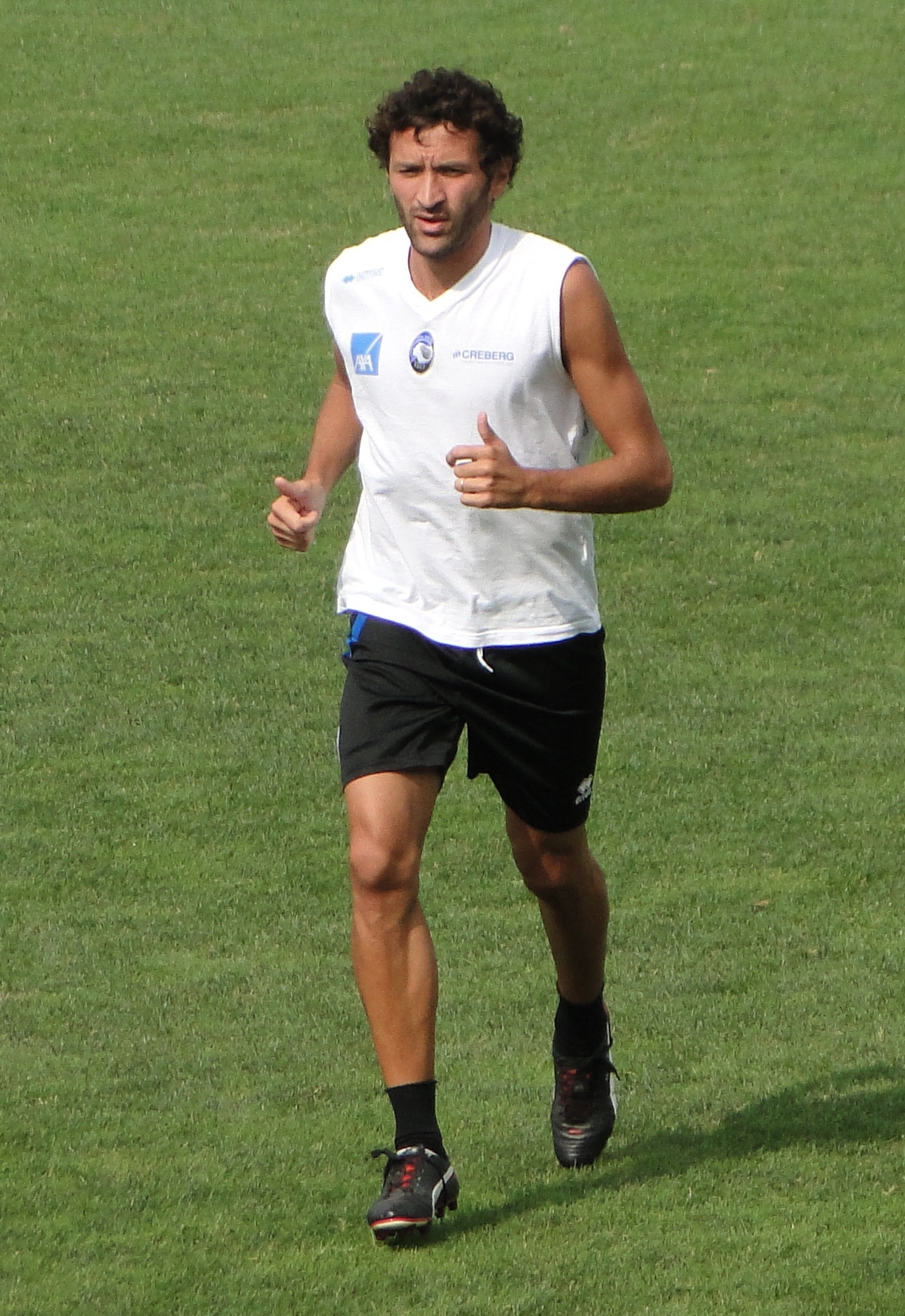 Cristian Raimondi, calciatore italiano